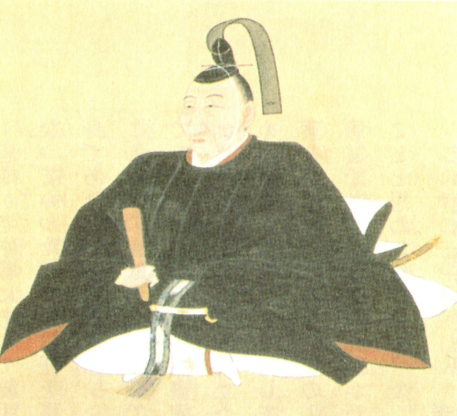 水野忠成の肖像。